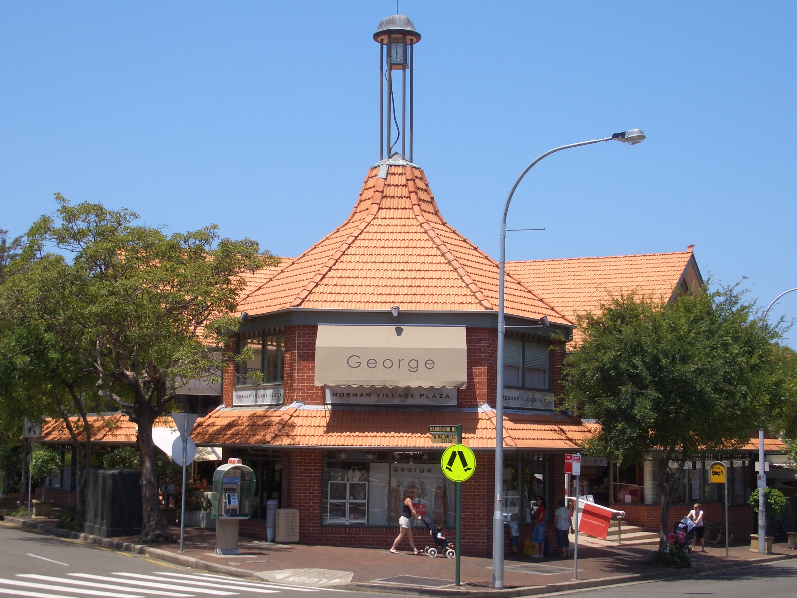 Mosman